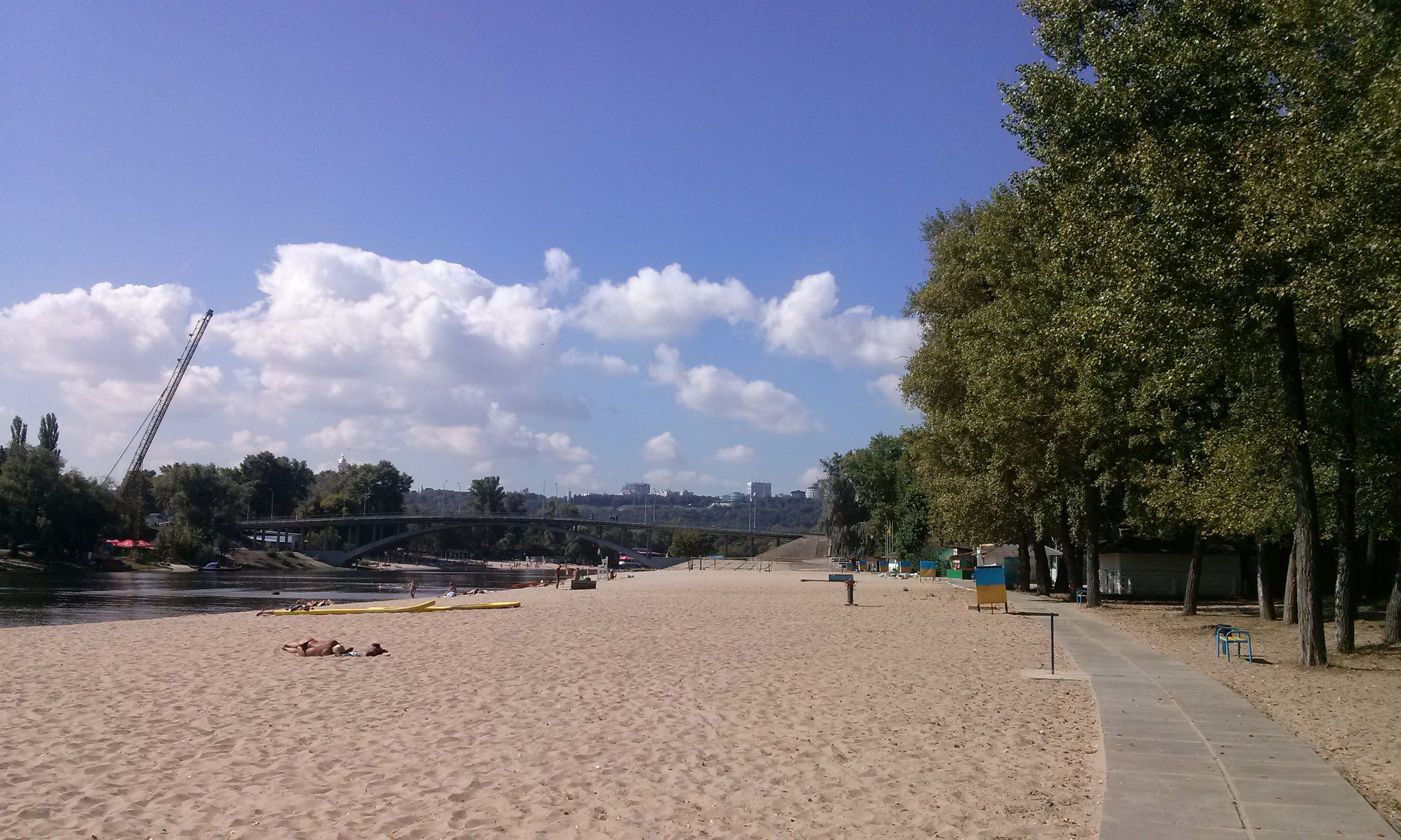 острів Долобецький, вид на міст і Венеціанськую протоку